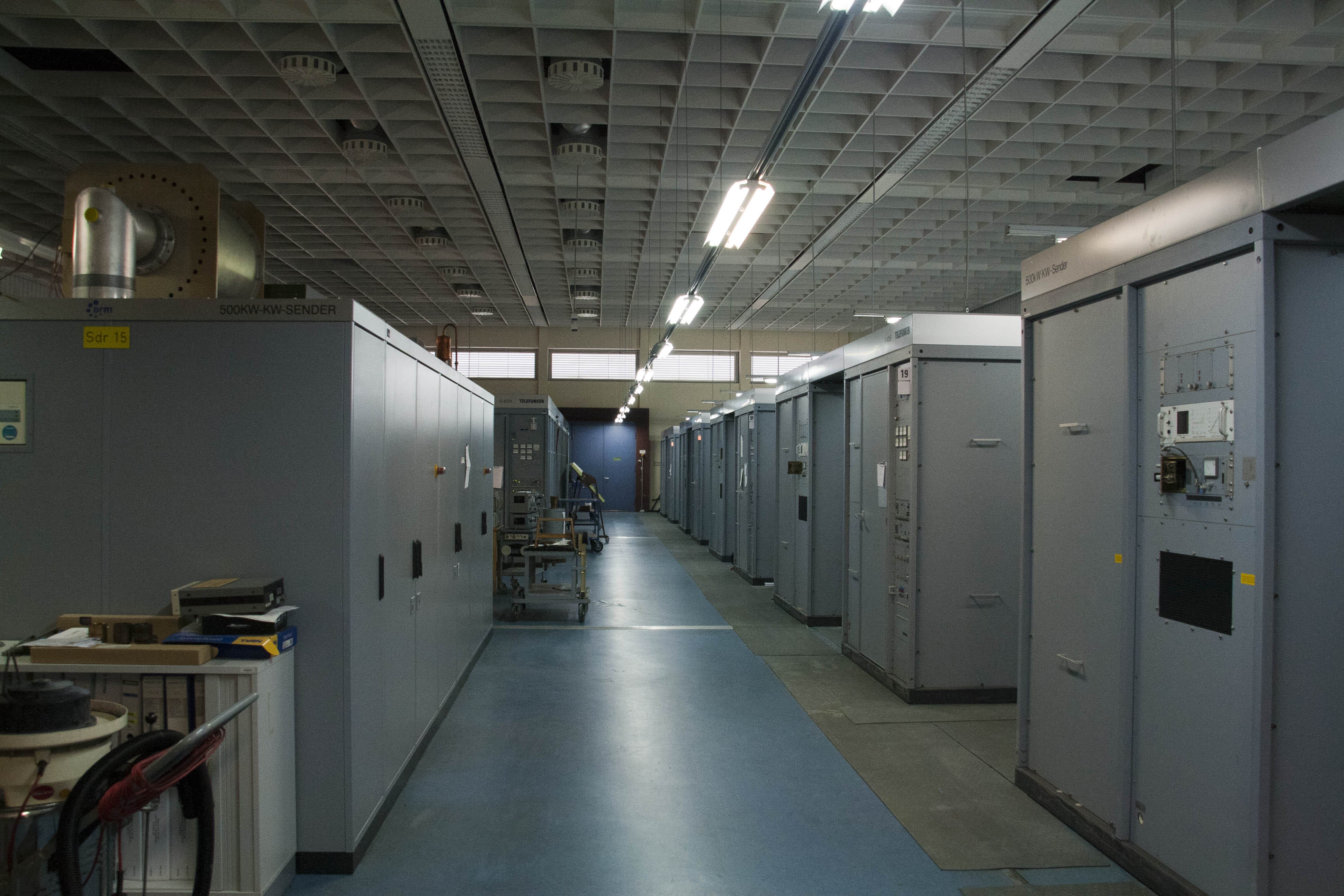 Zenders Wertachtal (D) kortegolf zendstation